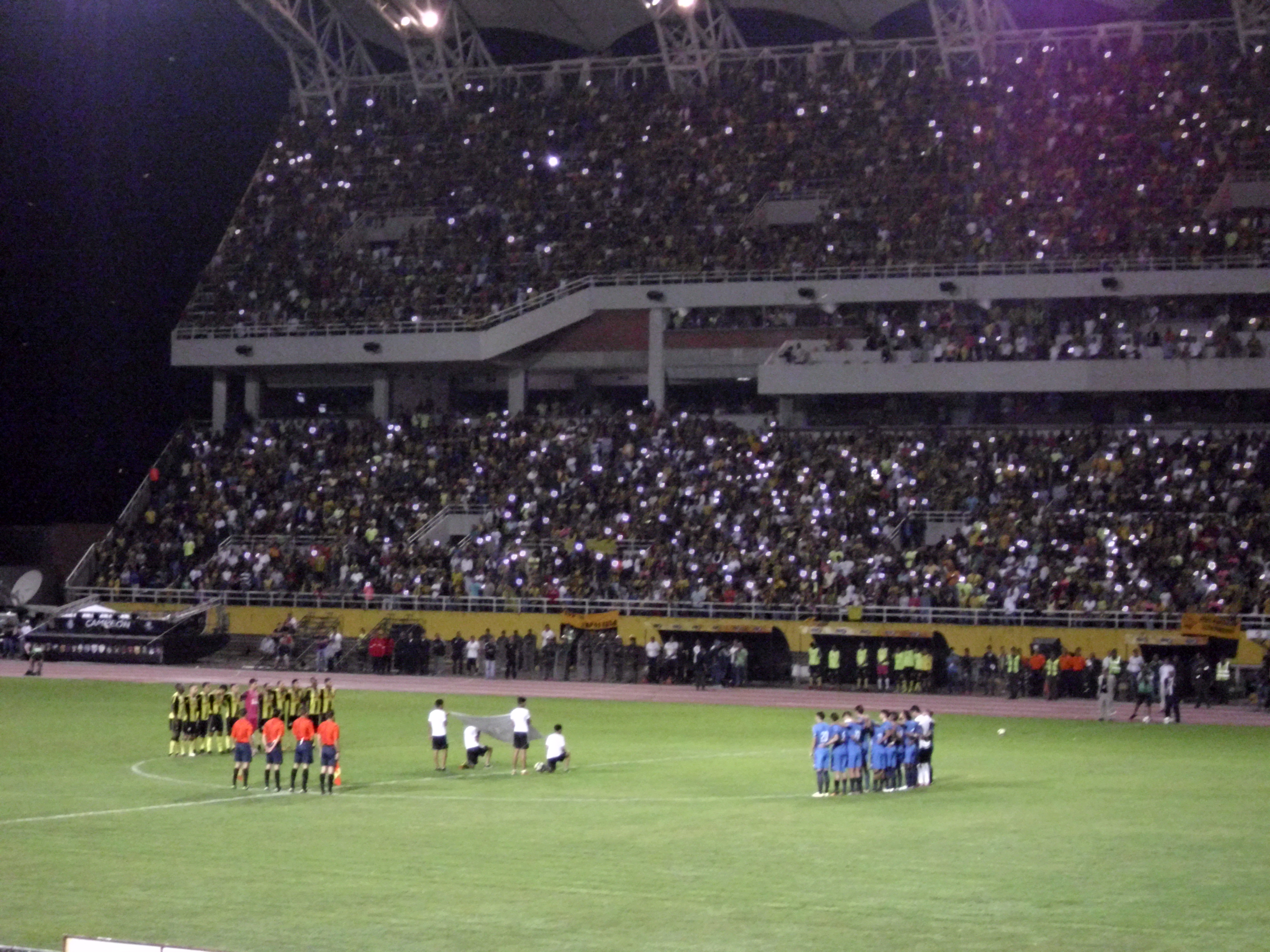 Minuto de Silencio en Homenaje a los Futbolistas de Chapecoense en el Polideportivo de Pueblo Nuevo (San Cristóbal, Venezuela).